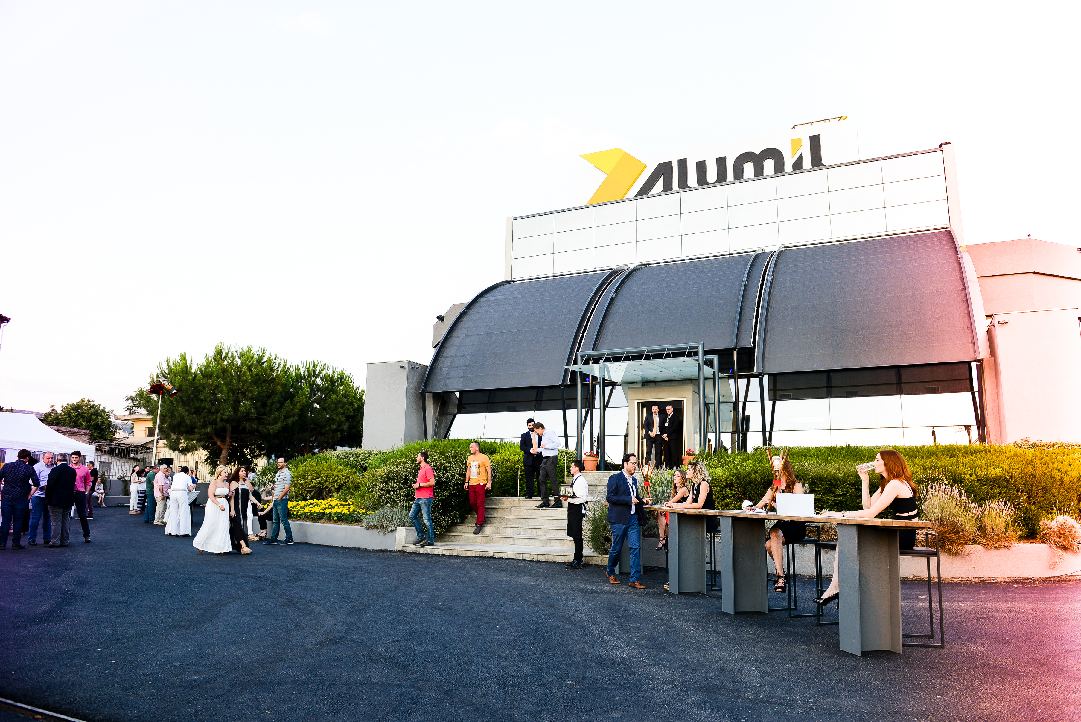 Κεντρικά γραφεία της Alumil στη Θεσσαλονίκη